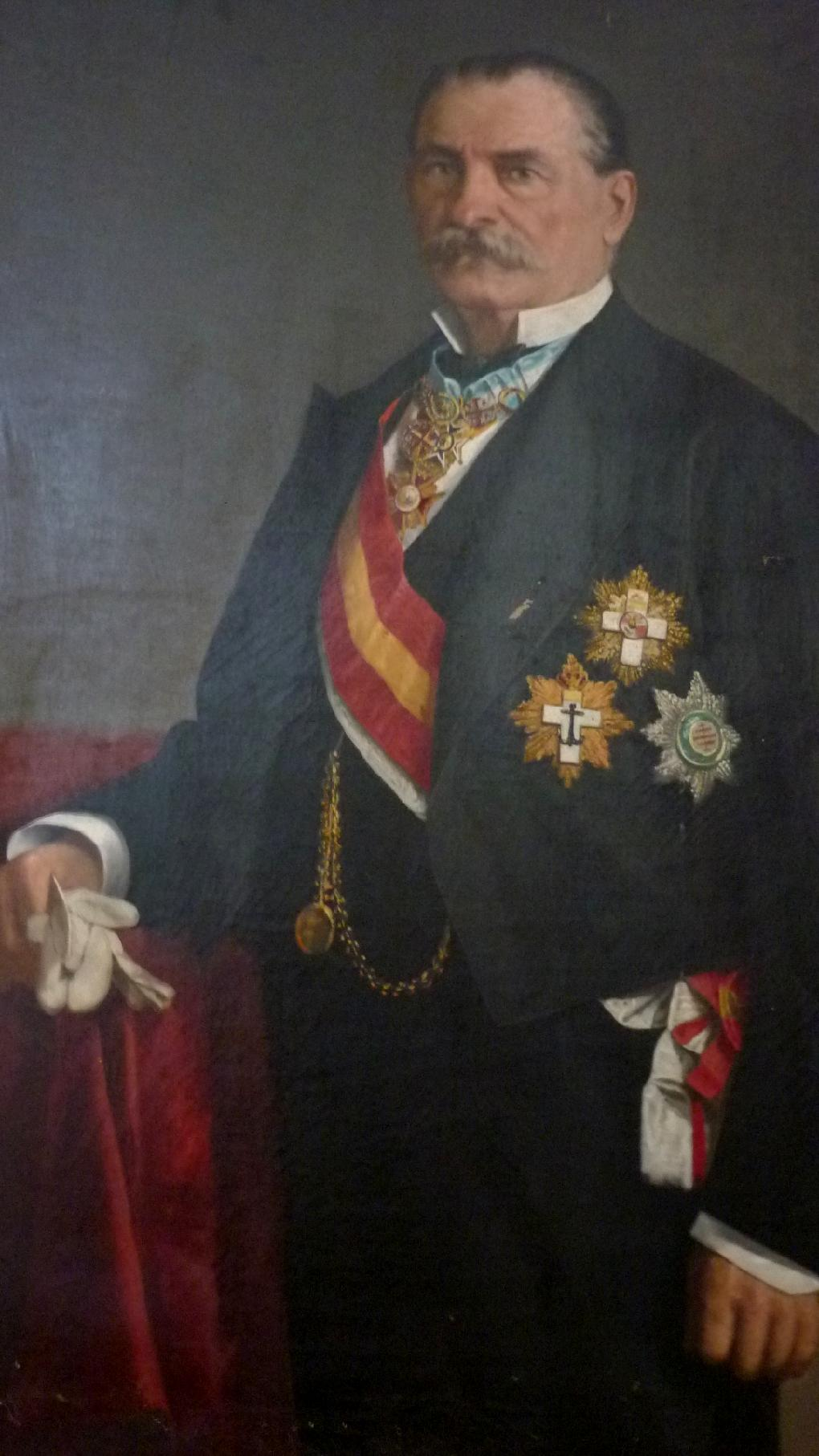 D. Ramon de Herrera and San Cibrian Count I of the Church of Mortera Mortera (Book 125 years)